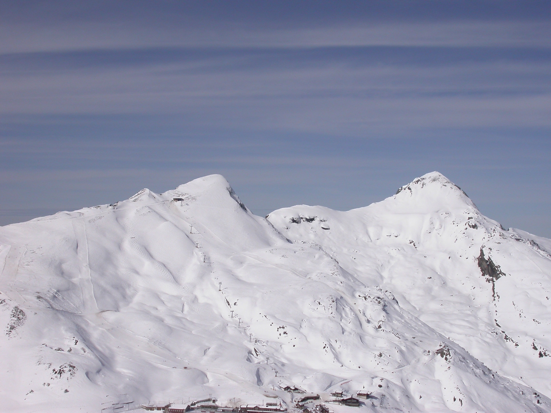 View from Eigergletscher on Lauberhorn and Tschuggen and train station at Kleine Scheidegg